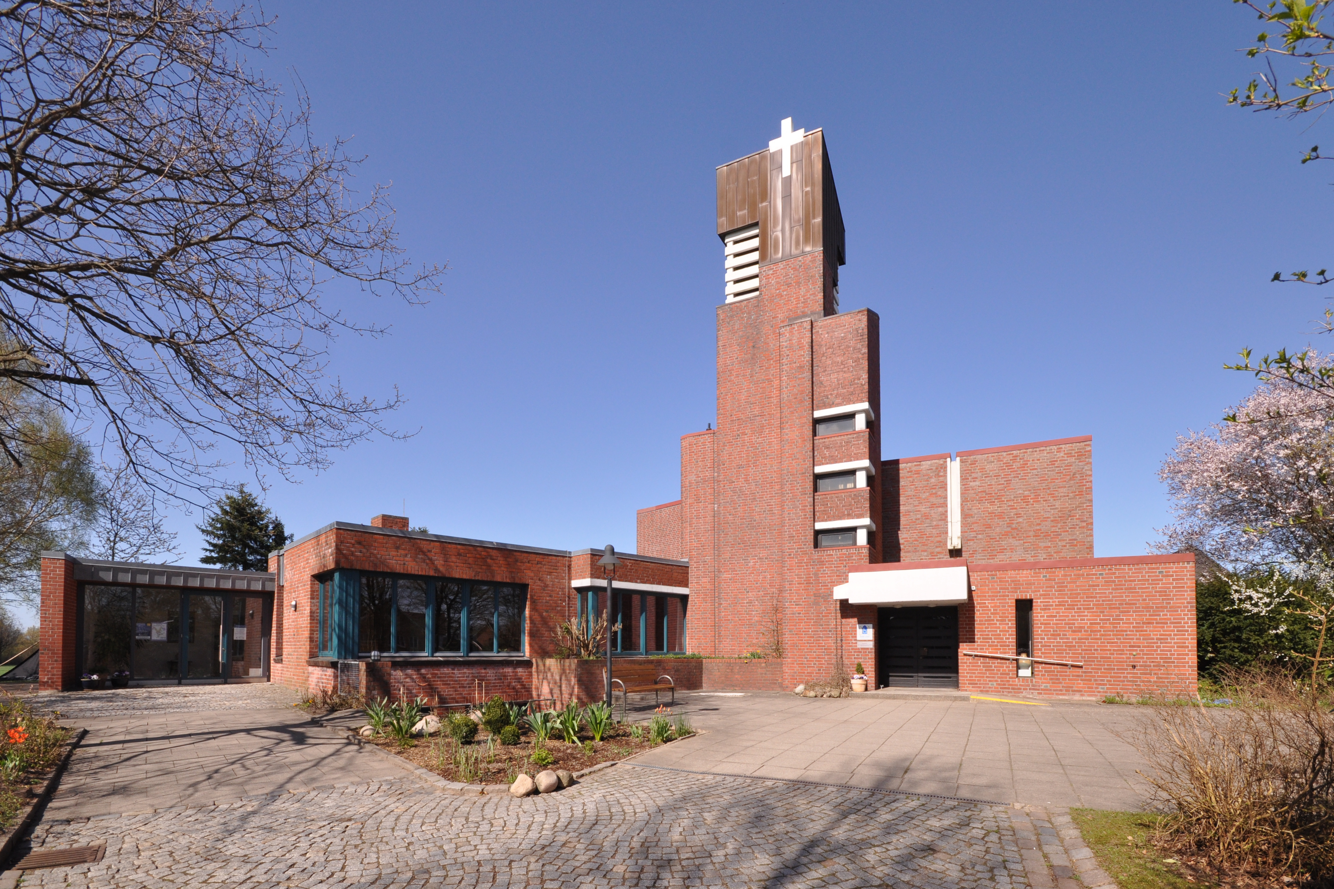 Kirche in Bargfeld, Ortsteil der Gemeinde Bargfeld-Stegen.